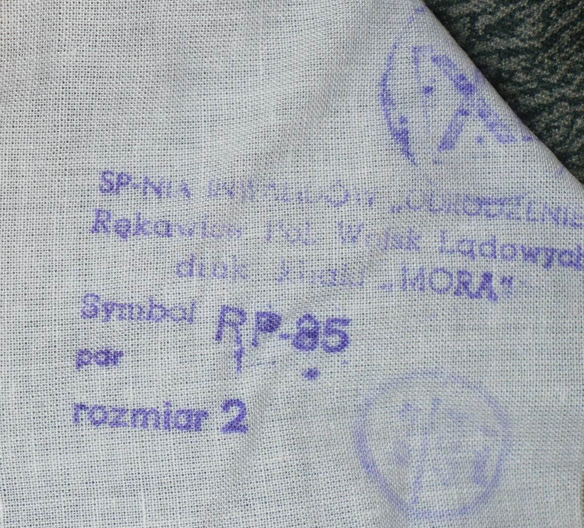 Metka rękawic polowych wojsk lądowych z tkaniny z nadrukiem mora